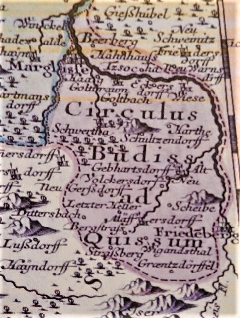 Circulus Budiss ad Quissum - Kartenausschnitt aus einer Matthäus Seutter Karte des 18. Jahrhunderts